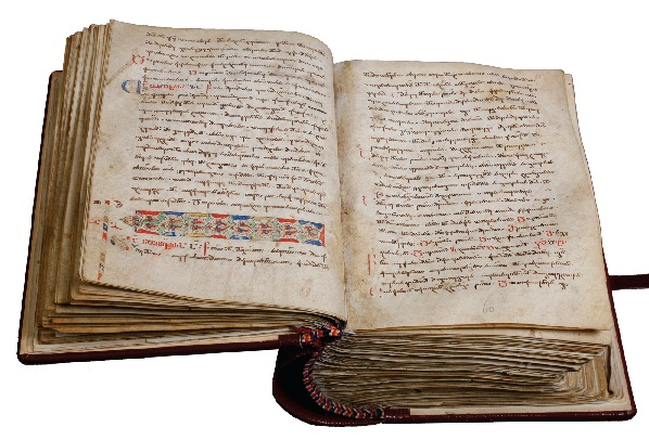 დიდი სვინაქსარი